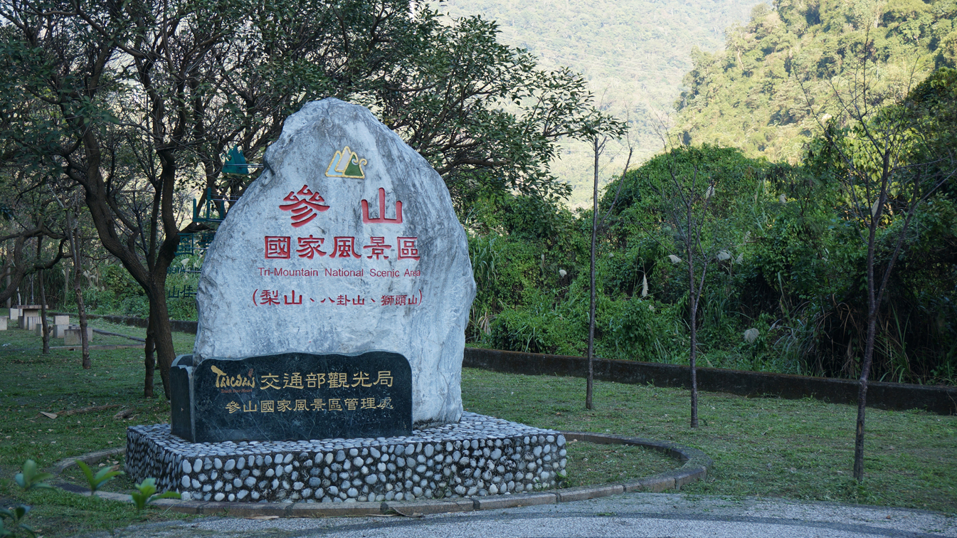 參山國家風景區標誌石，交通部觀光局參山國家風景區管理處立。